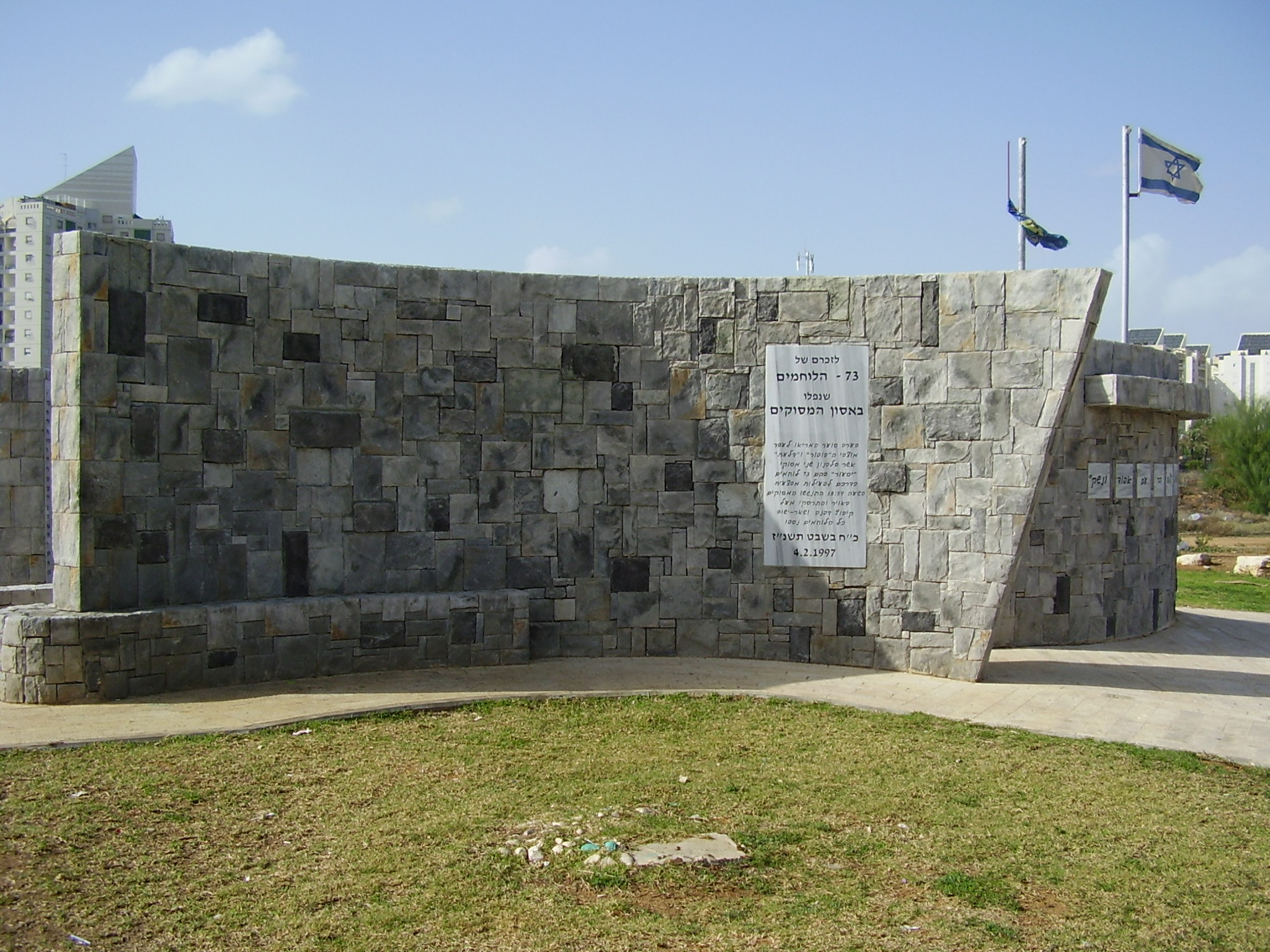 אנדרטה לנספים באסון המסוקים (1997) בפתח תקווה